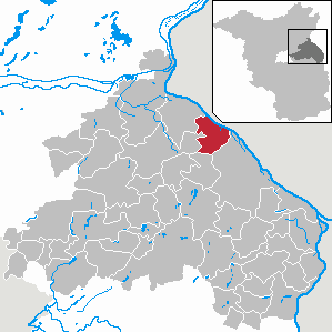 Neulewin in Brandenburg (Country) - District Märkisch-Oderland